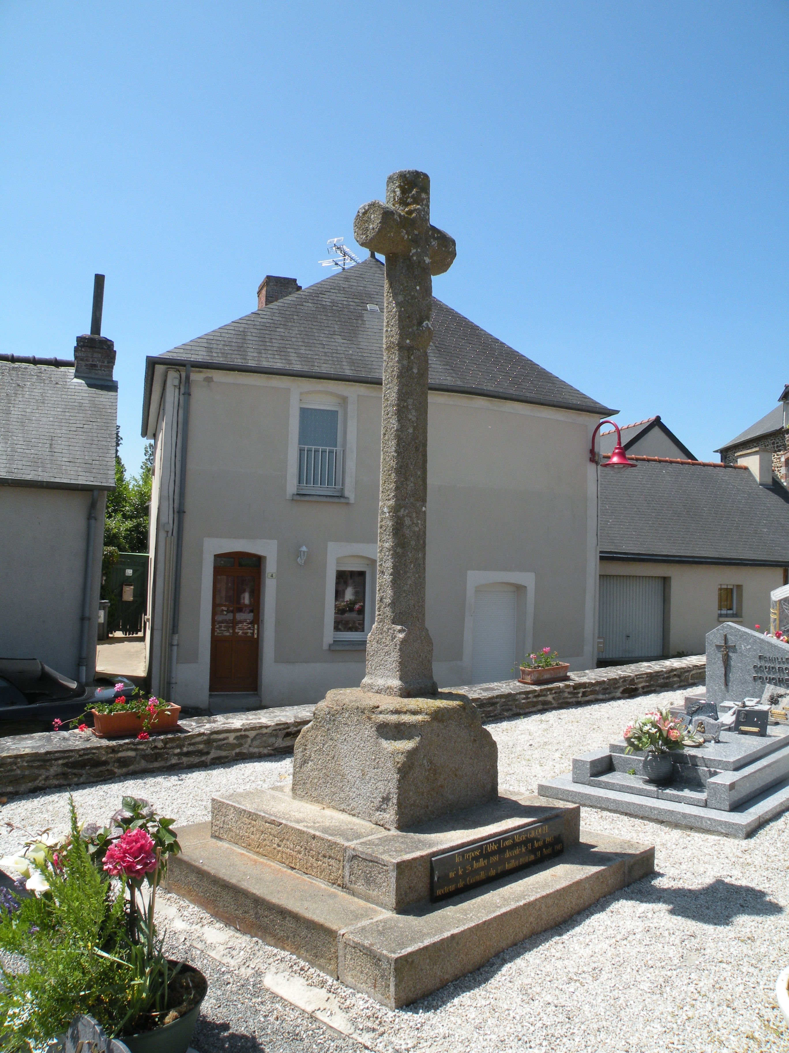 Tombe de l’abbé Louis Marie Gicquel (1881-1943).